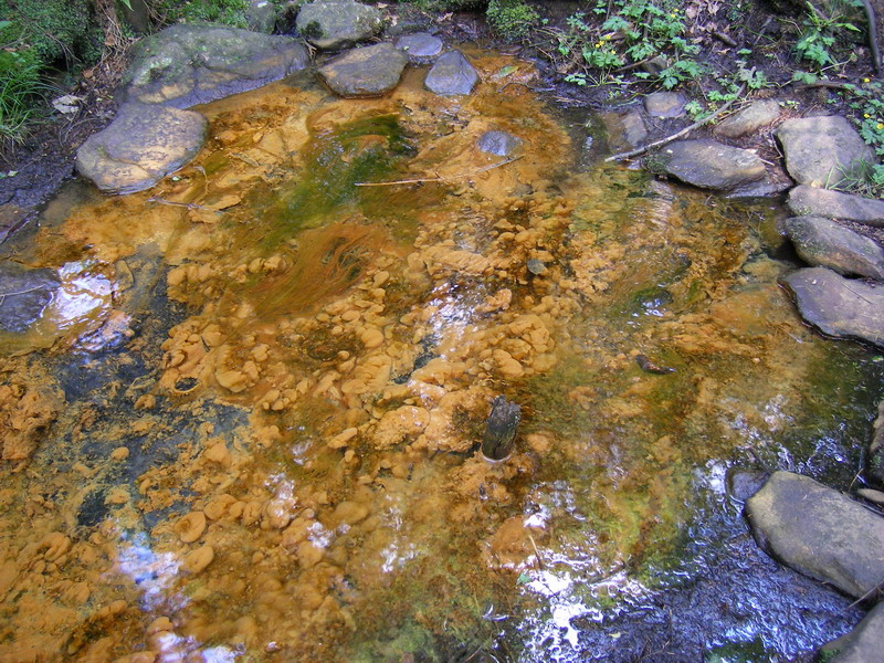 Sirný pramen, shluky "okrové bakterie"